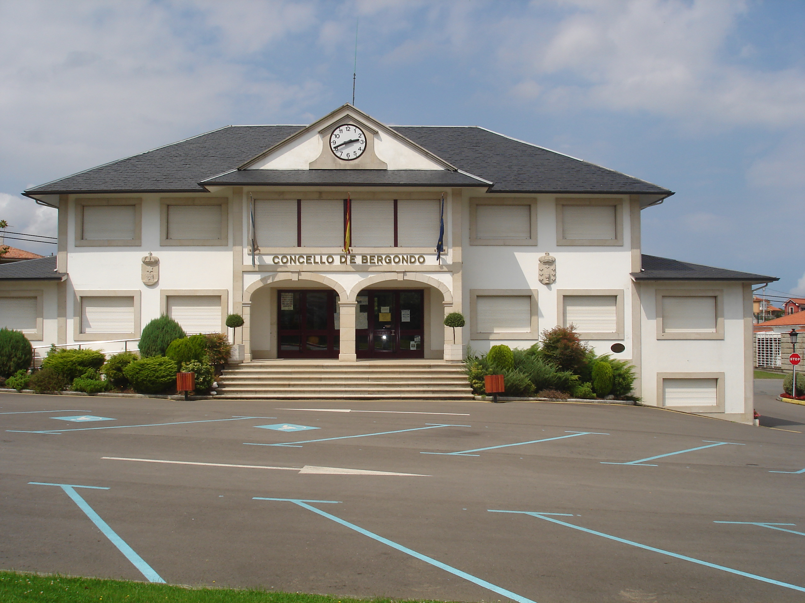 Casa do Concello de Bergondo